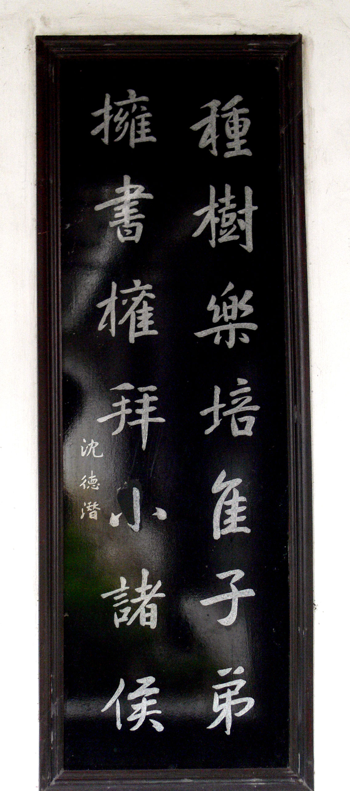 沈德潜对联